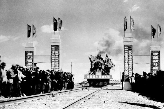 1960年6月1日，第一列载石油的火车驶出大庆油田。